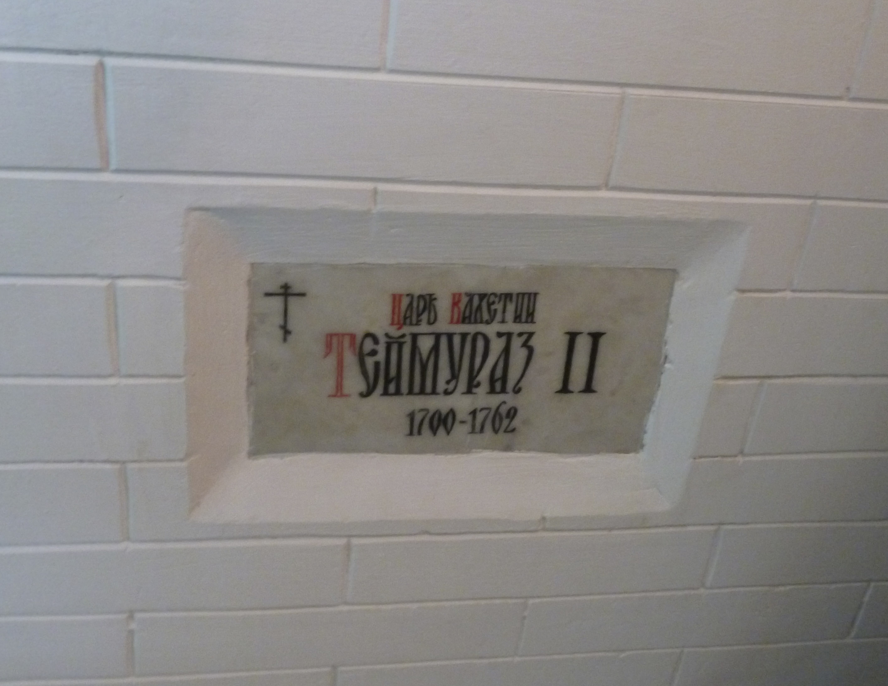 Захоронение грузинского царя Теймураза II в подклете Успенского собора Астрахани. После возвращения собора Русской православной церкви останки царя были перезахоронены у западной стены подклета собора.